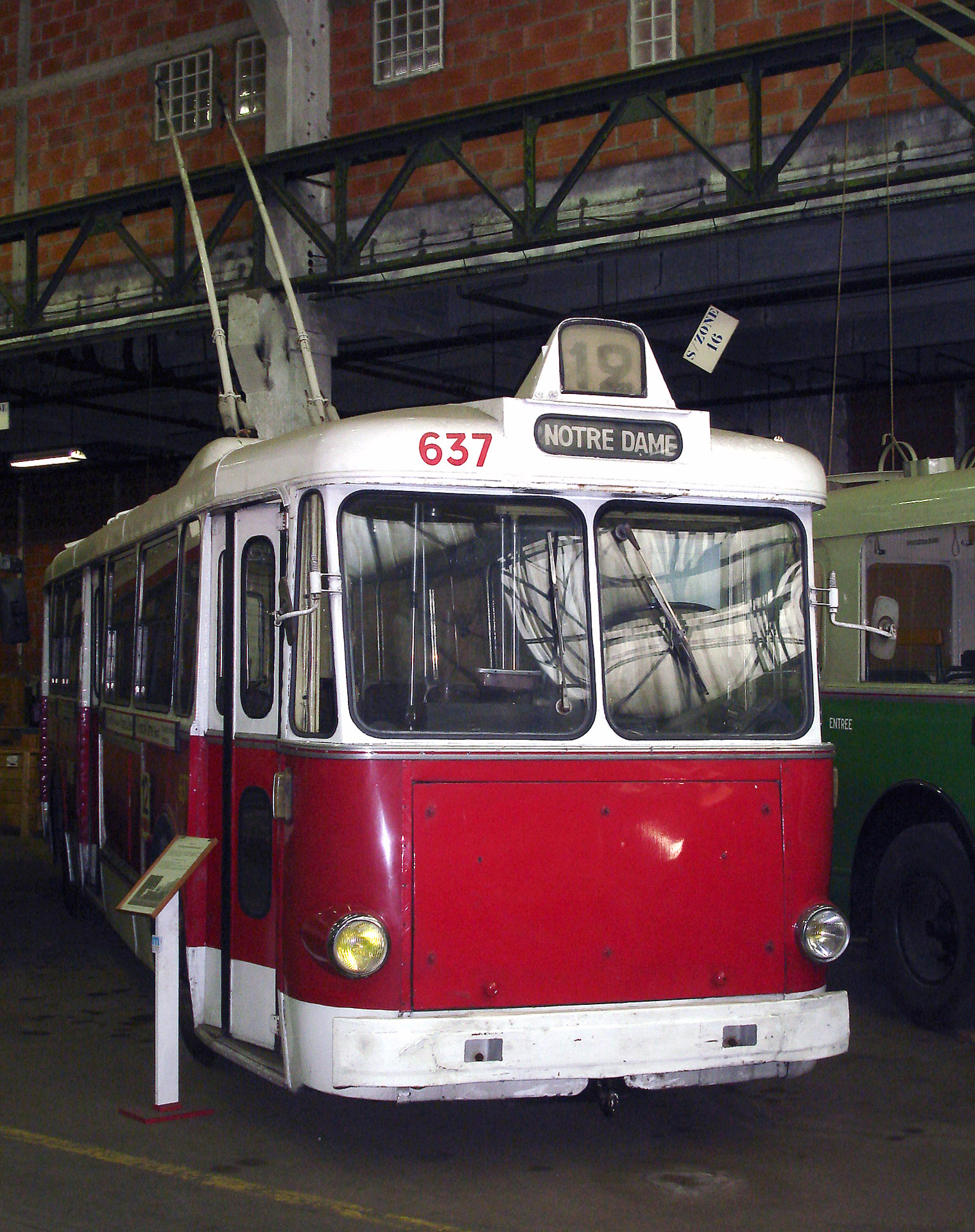 Trolleybus Vetra VBF de Grenoble. Journées du patrimoine le 15/09/2007 à l'AMTUIR, Colombes, France